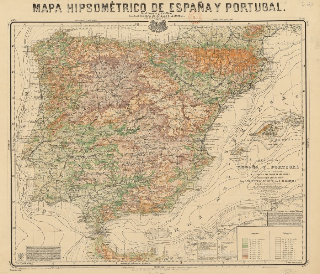 Mapa hipsométrico de España y Portugal, por el inspector general de minas Excmo Sr. D. Federico de Botella y de Hornos, escala 1:2 000 000.